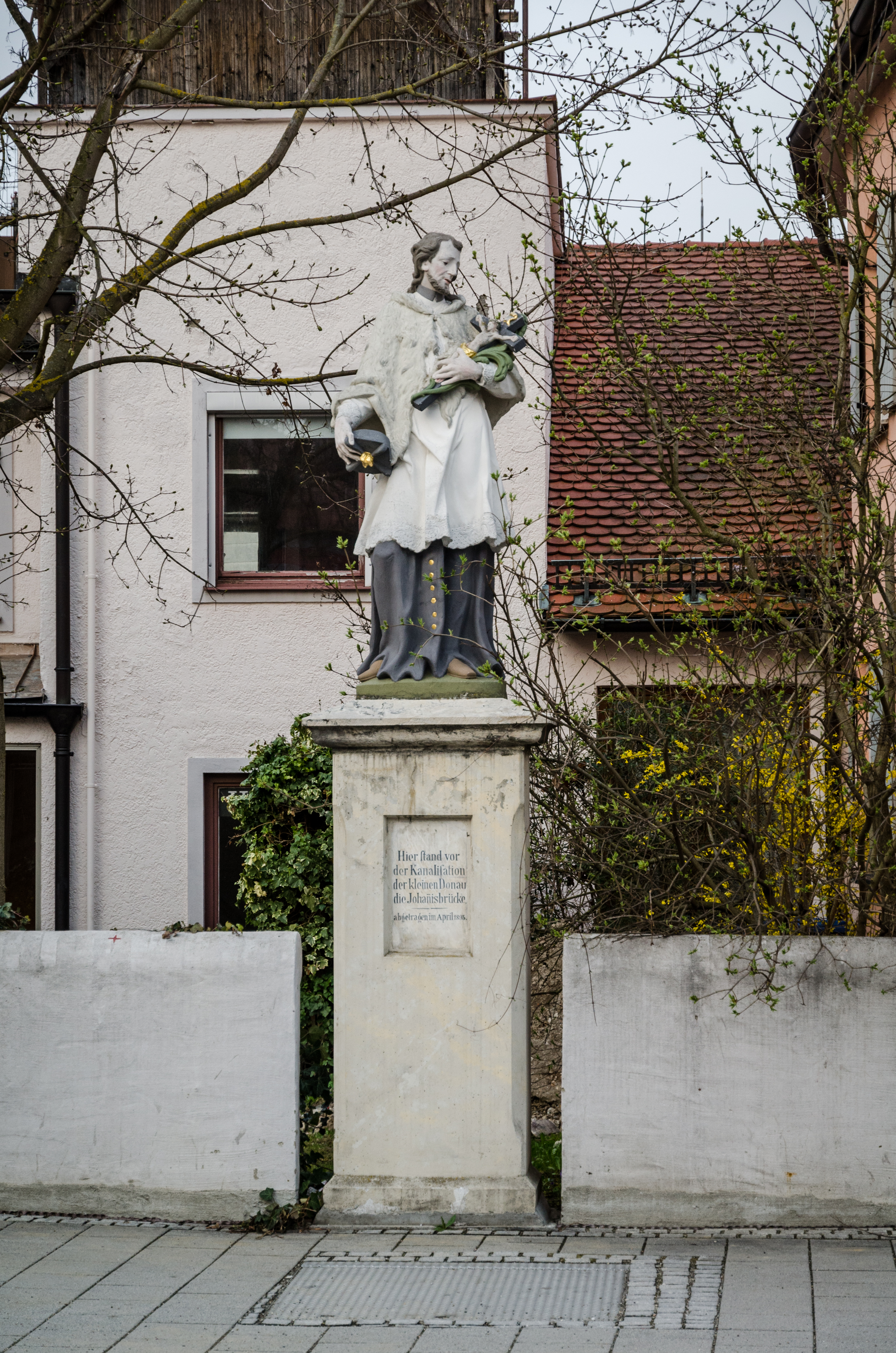 Dillingen, Kleine Donau, Nepomukfigur